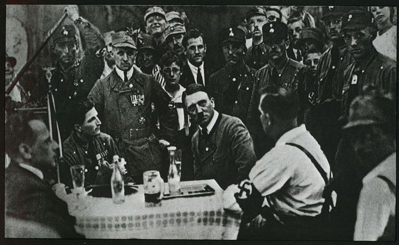 Собрание членов НСДАП в Мюнхене. В центре сидит А. Гитлер